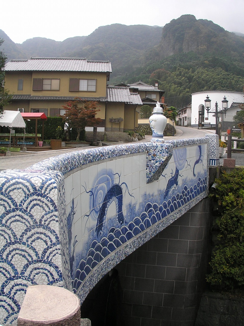 大川内山（おおかわちやま、佐賀県伊万里市)鍋島焼 橋 2